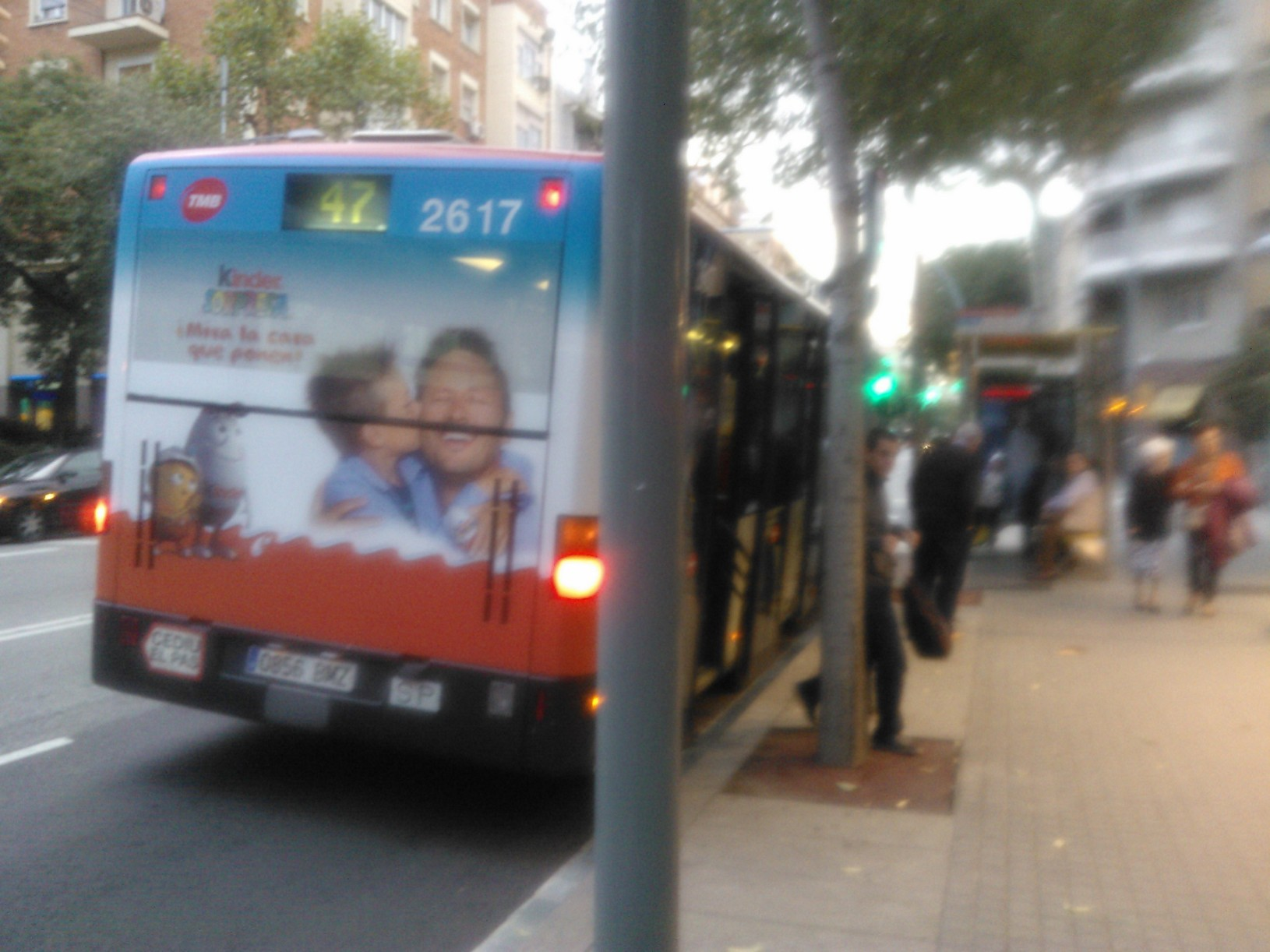 Autobús urbà de Barcelona